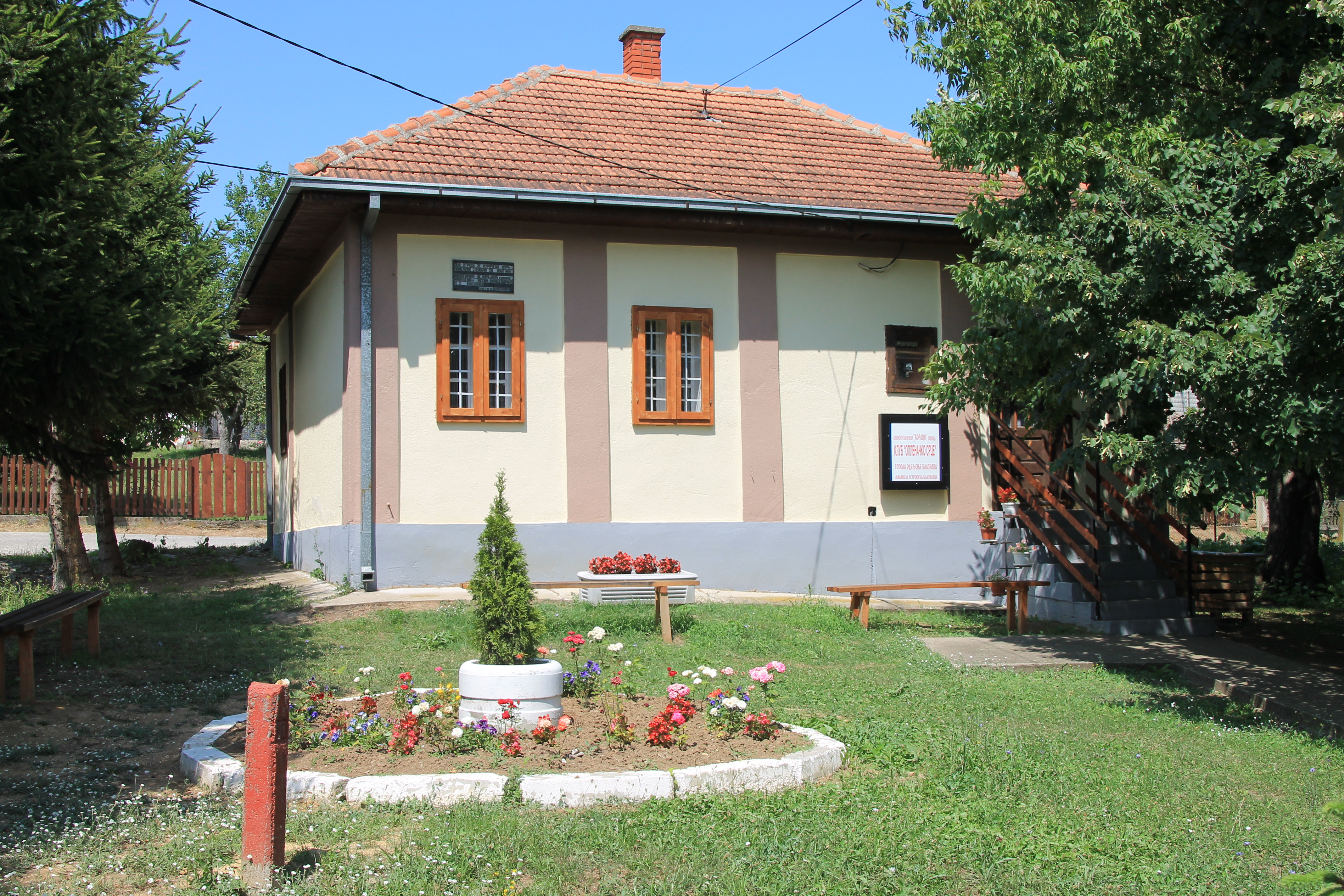 Blaznava